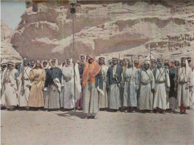 Arab Fighters Akaba Arabia (now Jordan)